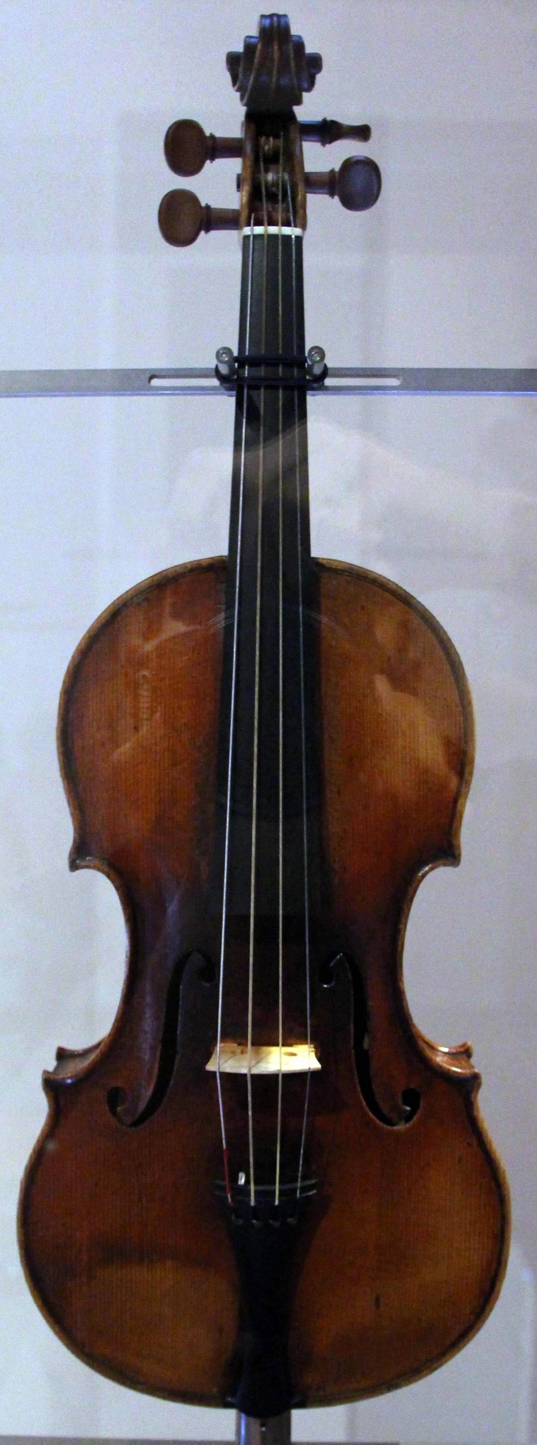 Palazzo Doria-Tursi - Musei di Strada Nuova This is a photo of a monument which is part of cultural heritage of Italy. The making of this document was supported by Wikimedia CH. (Submit your project!) For all the files concerned, please see the category Supported by Wikimedia CH.